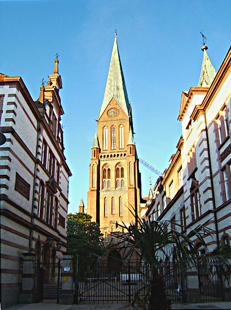 Schweriner Dom von der Mecklenburgstraße